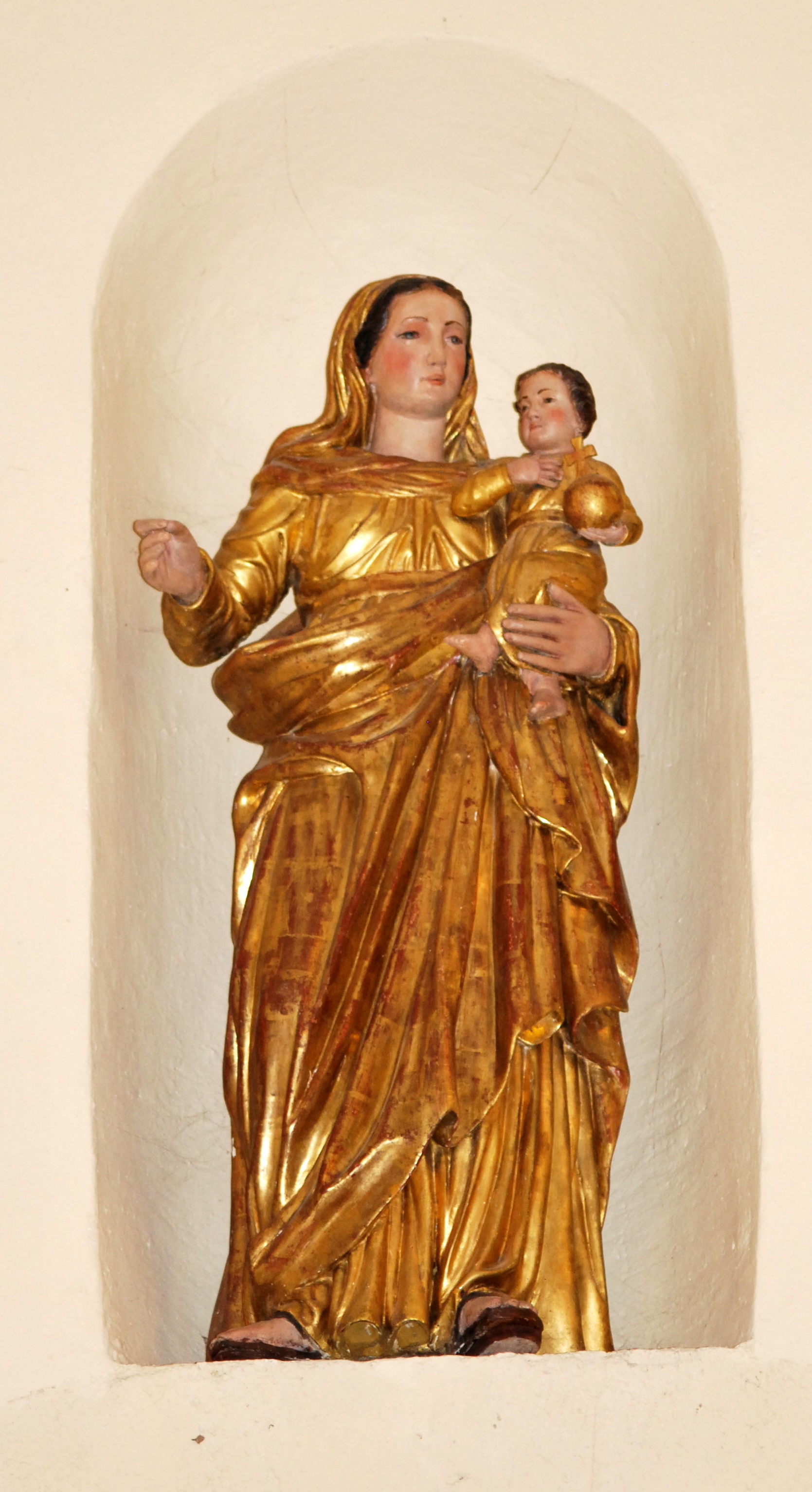 Landiras église Saint-Martin